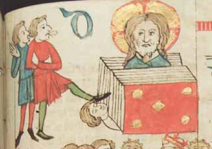 Eike Repgow